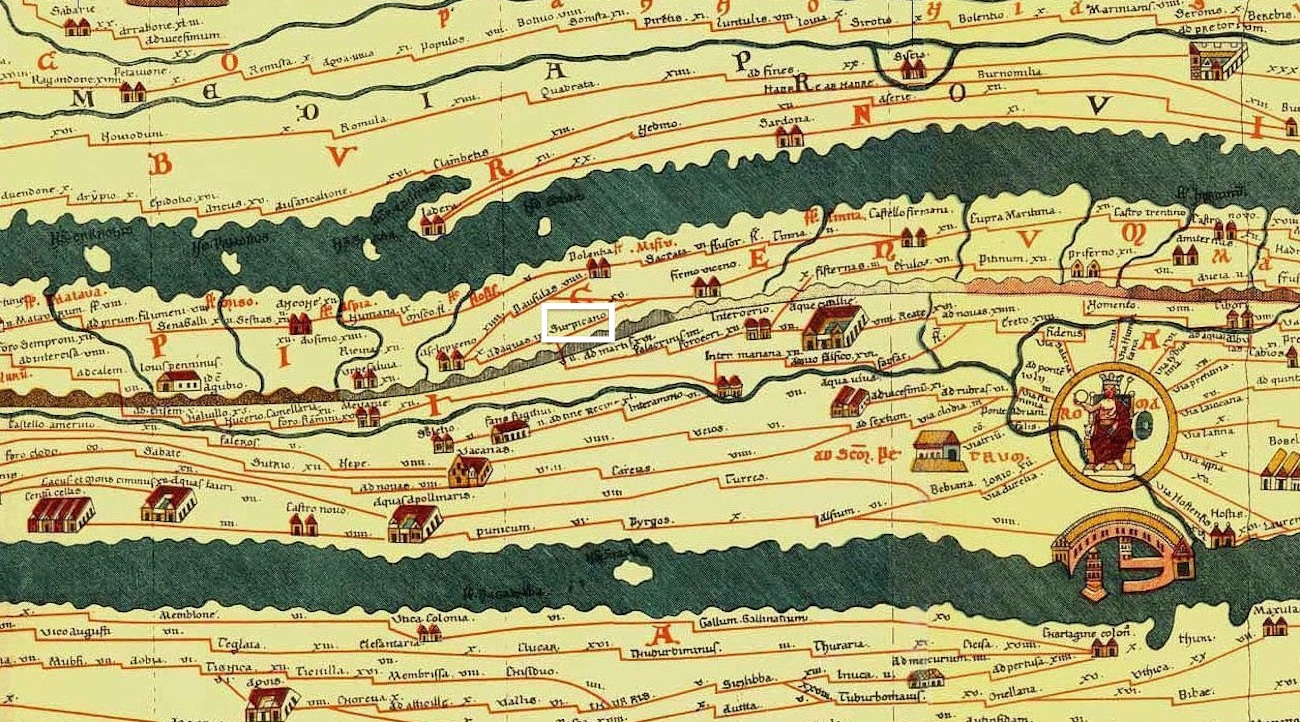 Porzione della Tabula Peutingeriana in cui è indicato il tracciato della Salaria che congiunge Roma all'Adriatico. Nel percorso della consolare è riportata la Statio di Surpicano, collocata dagli storici nei pressi della Chiesa di San Salvatore di Arquata del Tronto in provincia di Ascoli Piceno. (la Statio è stata evidenziata da una cornice bianca)